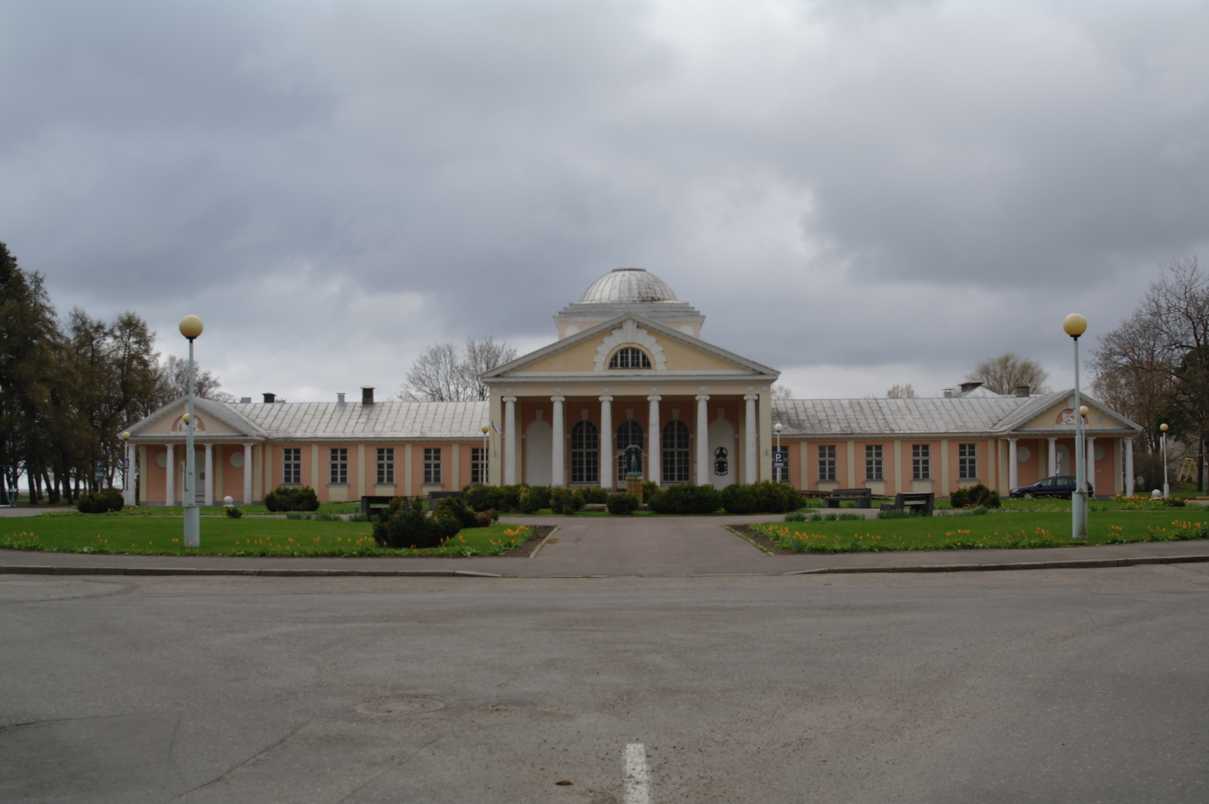 Pärnu mudaravila